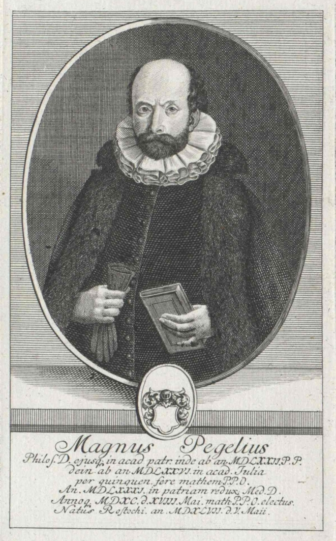 Potrait von Magnus Pegel